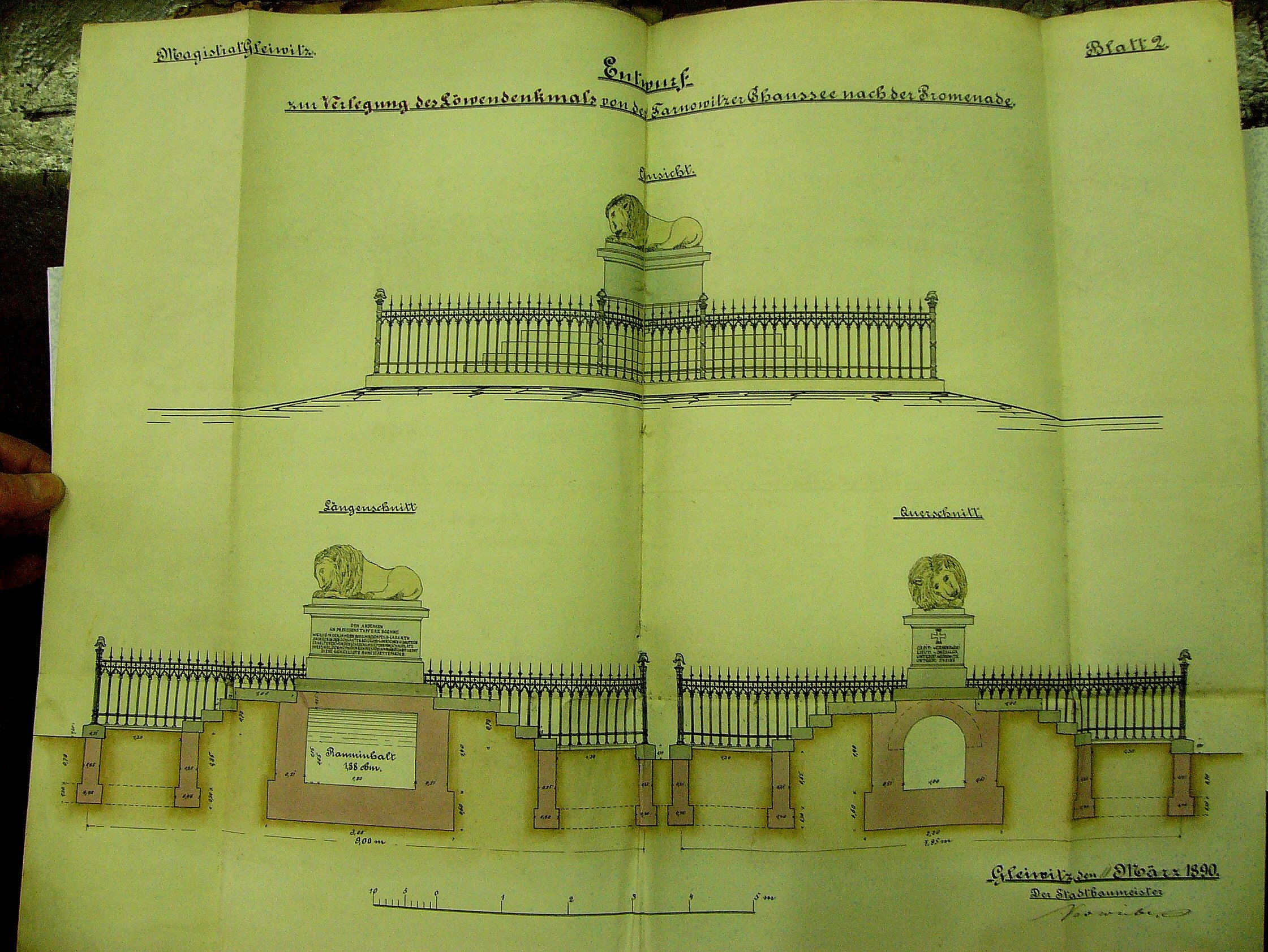 Foto eines alten Dokumentes von August 1890. Es zeigt das Blatt zwei des Entwurfs zur Verlegung des Löwendenkmals in die Promenade in Gleiwitz. Das Dokument wurde von mir in den Räumen des Staatlichen Archivs in Kattowitz, Abteilung Gleiwitz fotografiert. Die Erlaubnis, die Fotografie auf Wikipedia zu veröffentlichen, wurde vom Leiter der Archiv-Abteilung erteilt.